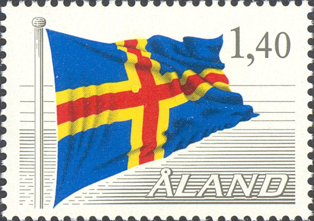 Страна: Аландские острова Серии: Definitives Код по каталогу: Michel Åla 4 Тематический список: Флаги Дата выпуска: 1984-03-01 Дата истечения срока действия: 2002-06-30 Формат: Марка Издание: Definitive Перфорация: 14 Печать: Offset Размер: 34.5 x 24.5 мм Цвет: Многоцветный Номинальная стоимость : 1,40 mk - Финская марка